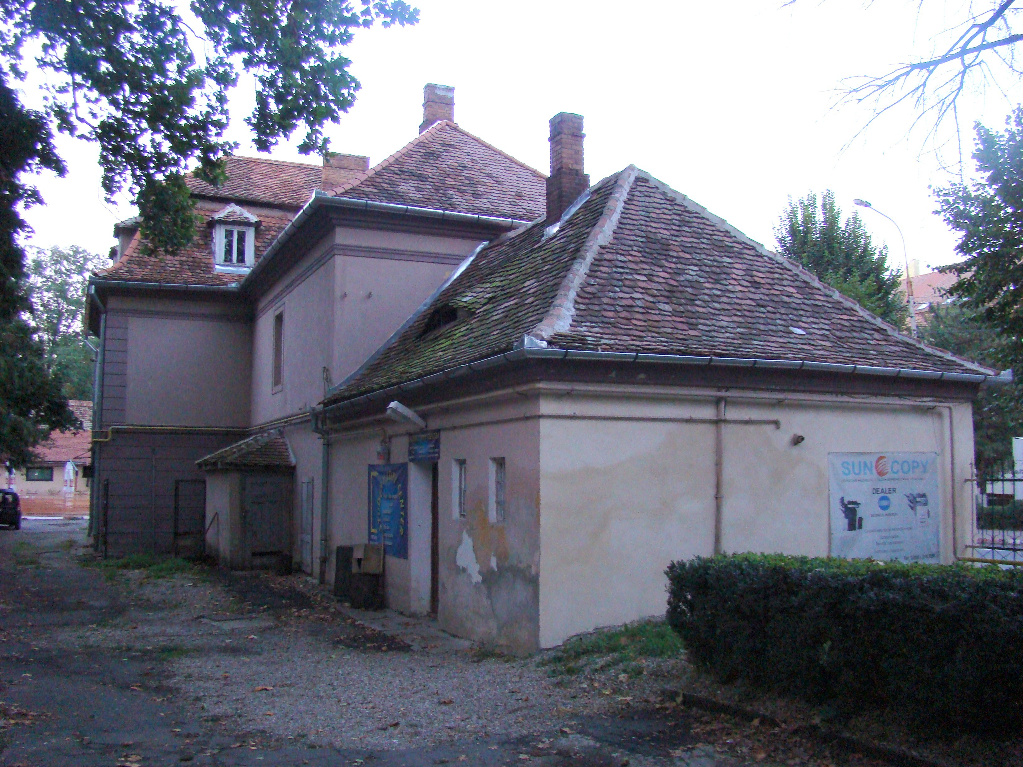 Ansamblul fostului seminar evanghelic din Sibiu (Corpul E) 05